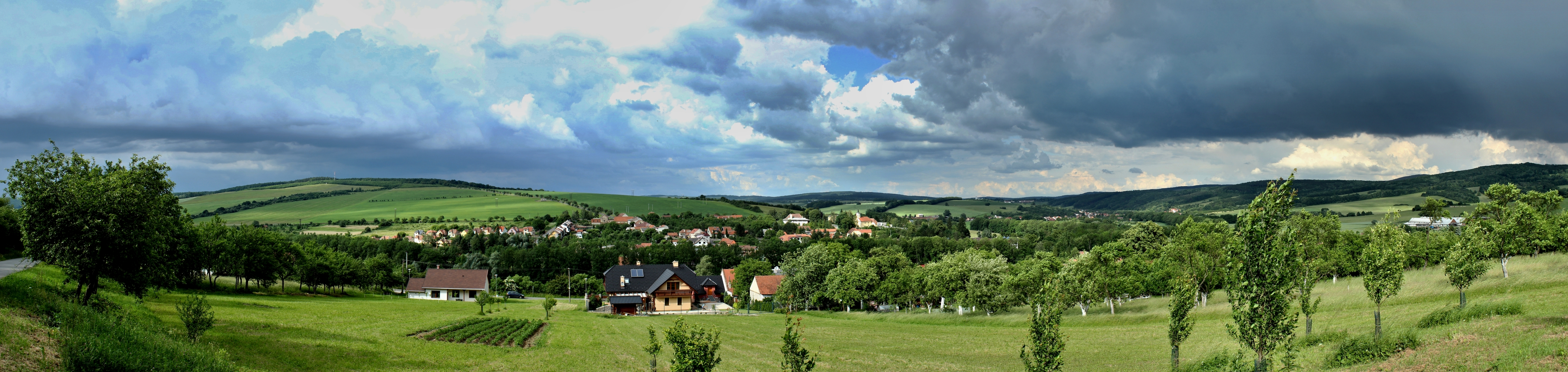 Panorama Nezdenic z Horních dílů.